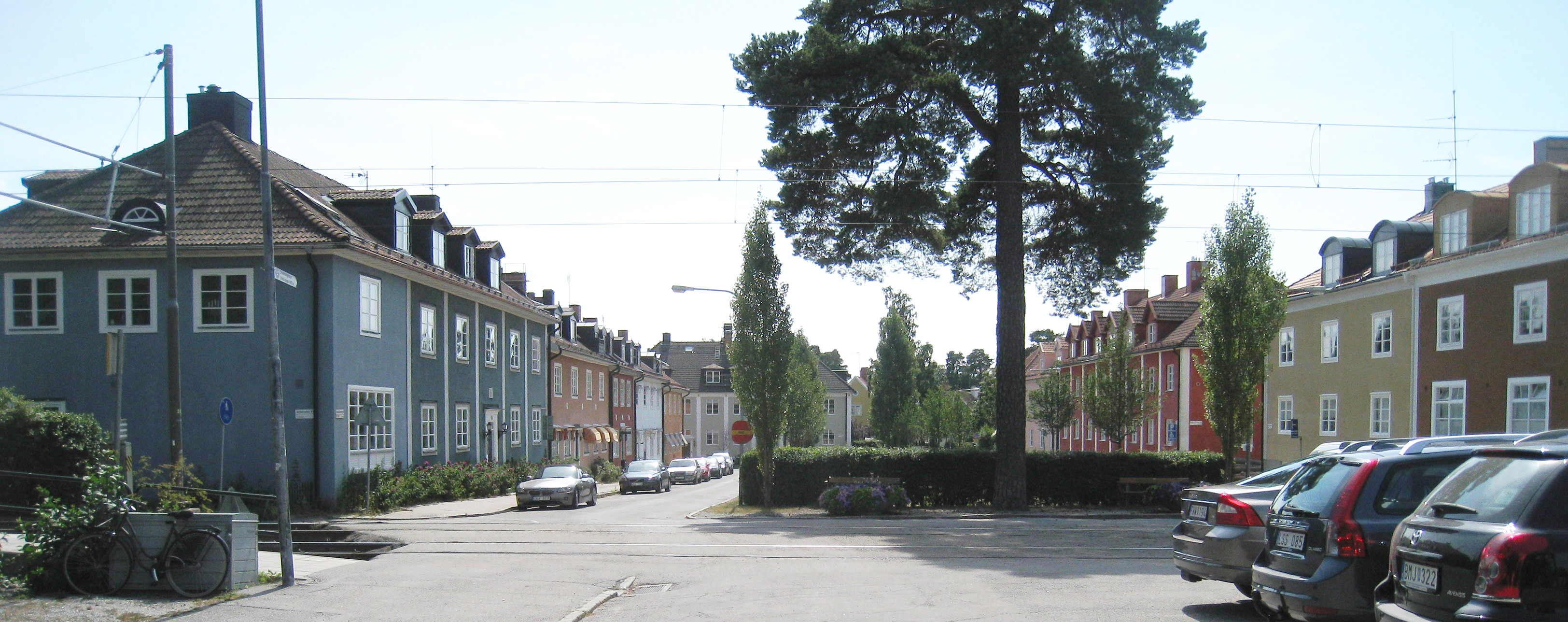 Smedslättstorget. Vy mot söder.